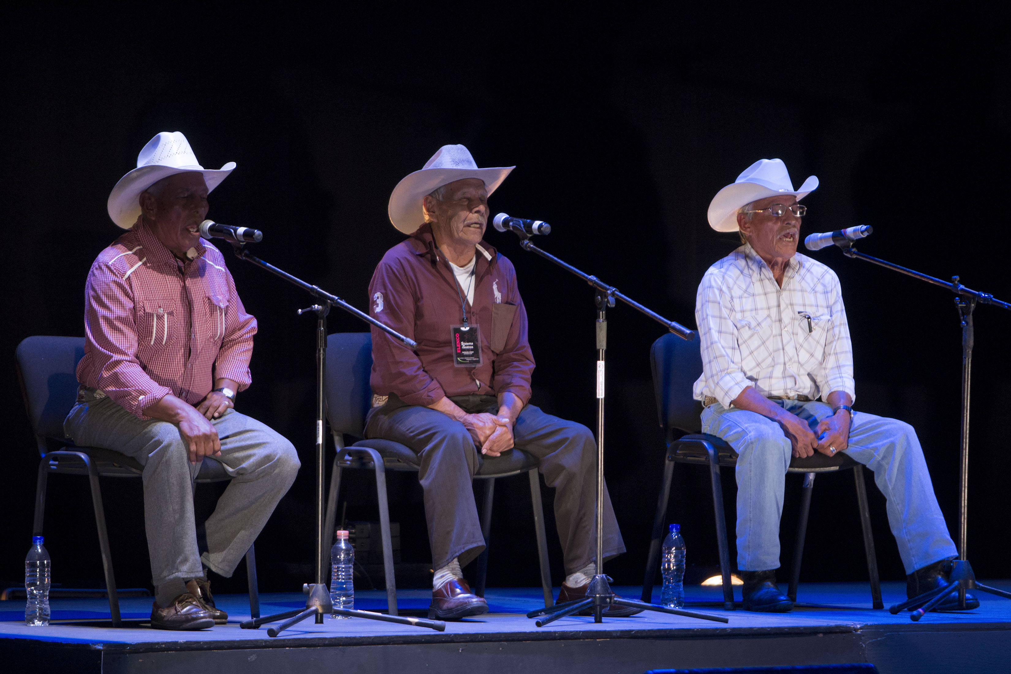 Sábado 1 de octubre de 2016 En el Teatro de la Ciudad Esperanza Iris se presentó el espectáculo Al pie de un árbol. Celebrando el canto Cardenche, a cargo de Los Cardencheros de Sapioriz y el Coro Acardenchado, dirigido por Juan Pablo Villa. Fotografía: Maritza Rios / Secretaría de Cultura CDMX